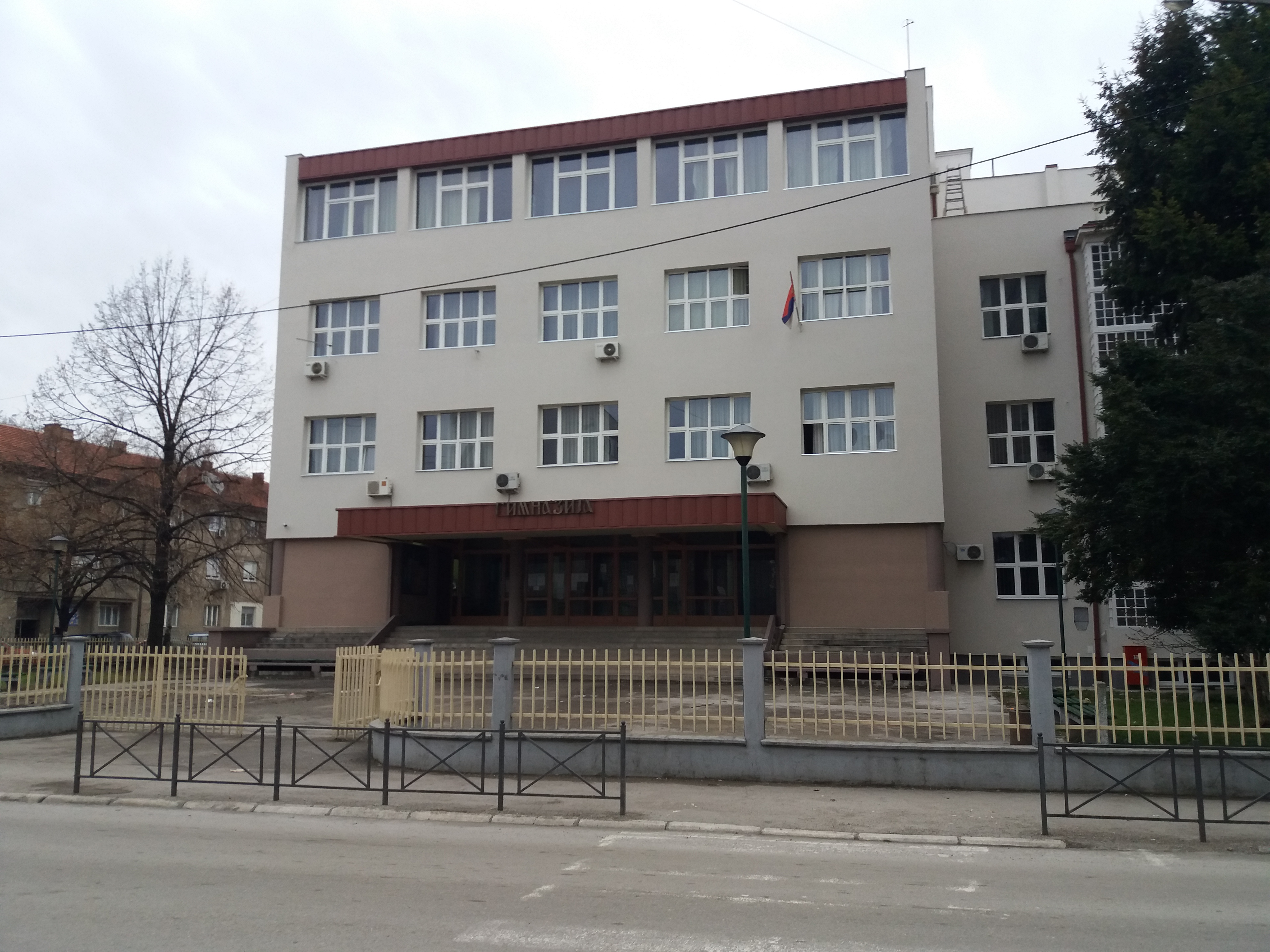 Srpski (latinica): Gimnazija Leskovac